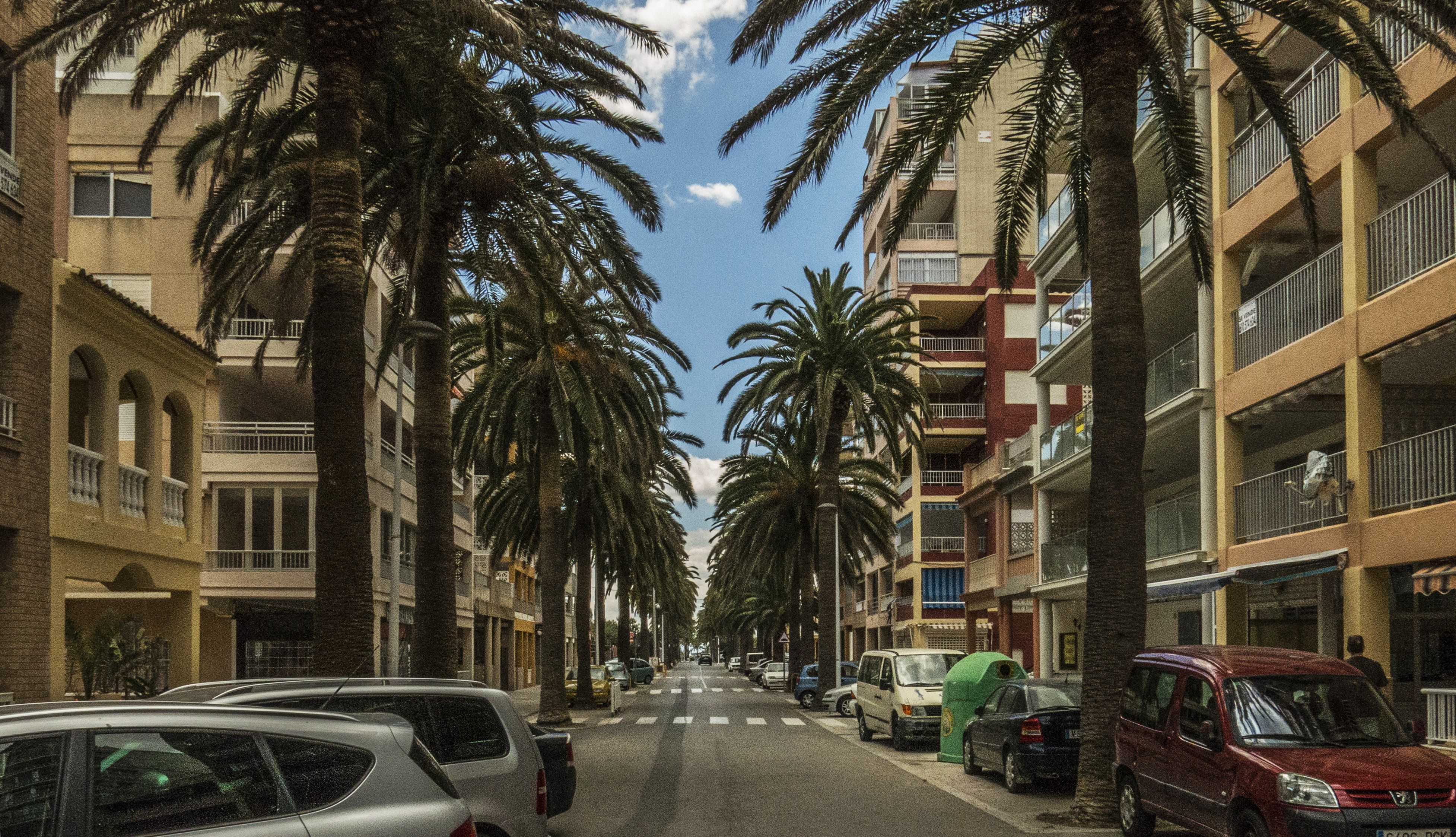 Les Palmeres, és una localitat del terme de Sueca, situada al nord del Mareny de Barraquetes i al sud del Perelló, a la Ribera Baixa del País Valencià.